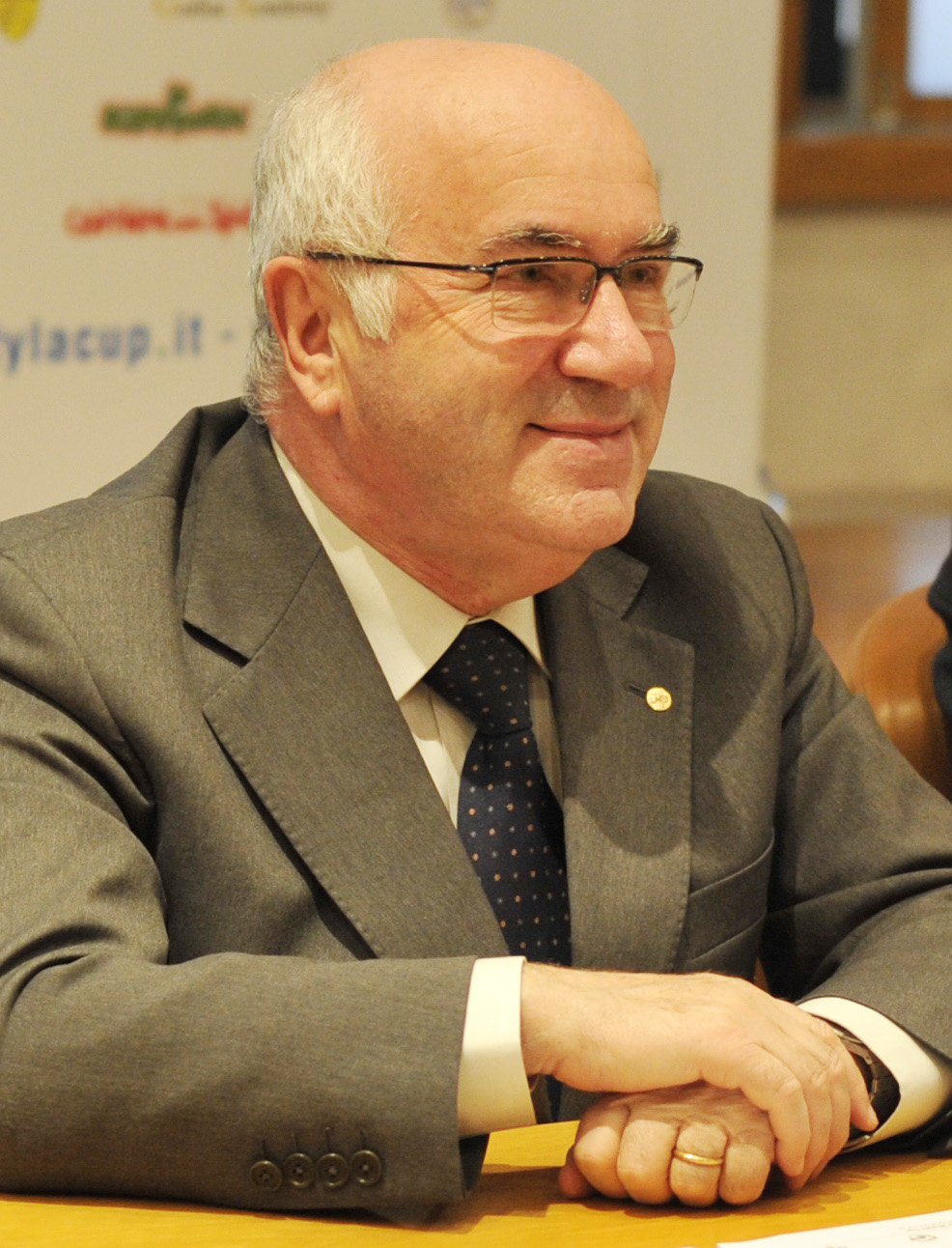 Il Presidente della L.N.D. Carlo Tavecchio durante la Conferenza stampa di presentazione del Trofeo Karol Wojtyla edizione 2010